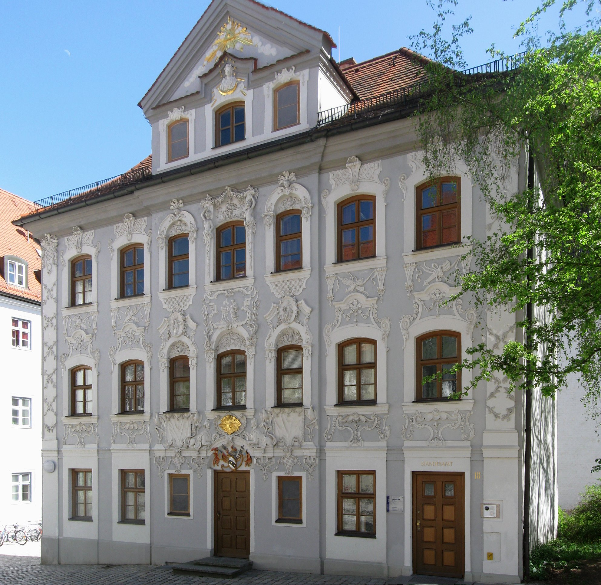 Rindermarkt 18; Wohnhaus (Ziererhaus), ehem. Wohnhaus des Hofmaurermeisters Lorenz Hirschstötter, sog. "Ziererhaus", jetzt Standesamt, dreigeschossiger Eckbau mit Zwerchhaus und reich stuckierter Fassade nach Norden, um 1730, Inneres um 1980 entkernt. D-1-78-124-192